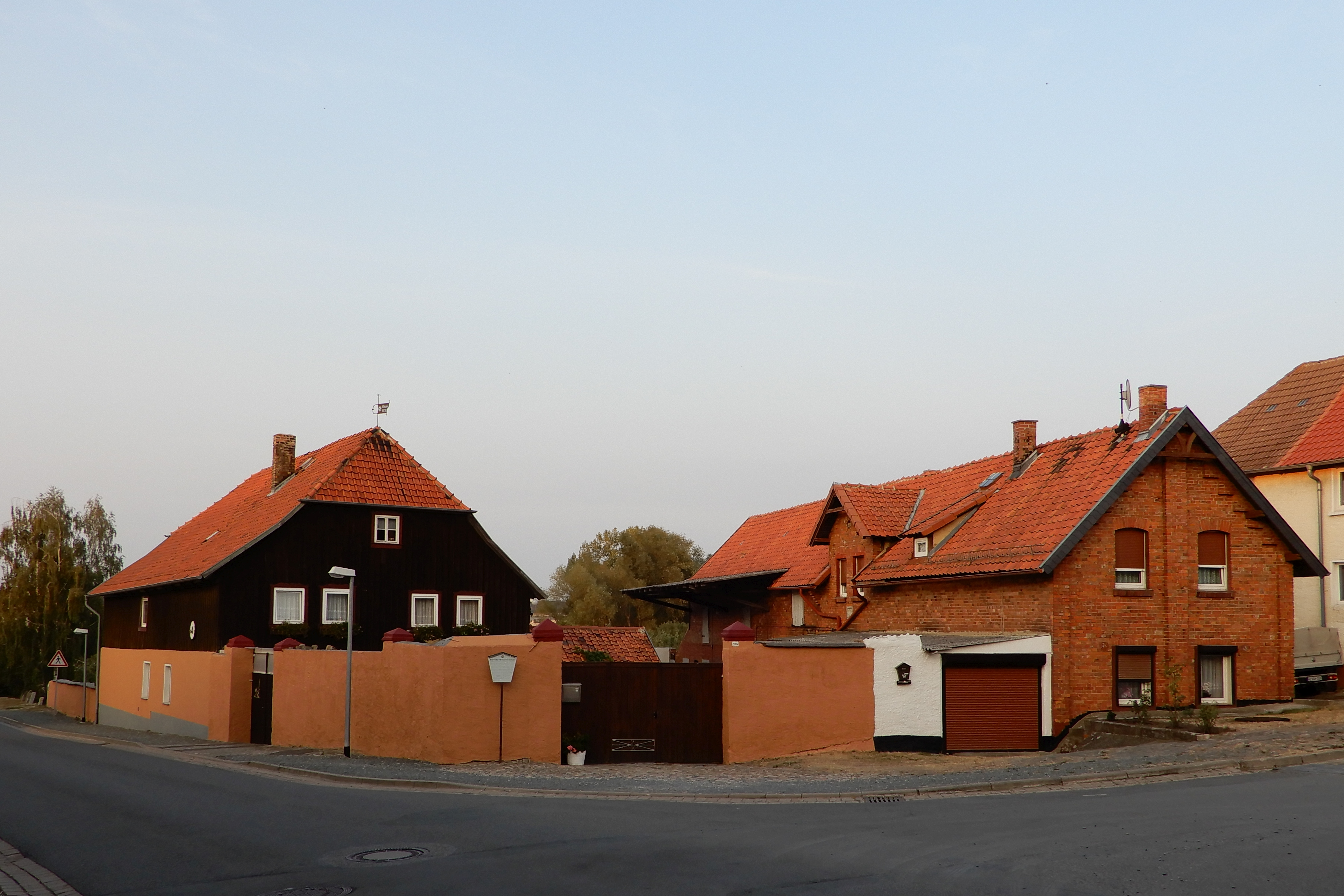 Untermühle (Westerhausen)